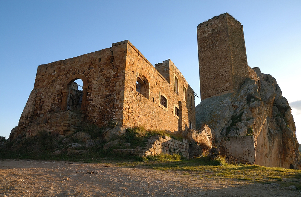 Aidone EN_Sicilia:Castello rupestre di Pietratagliata, lato nord, in primpo piano la Chiesa